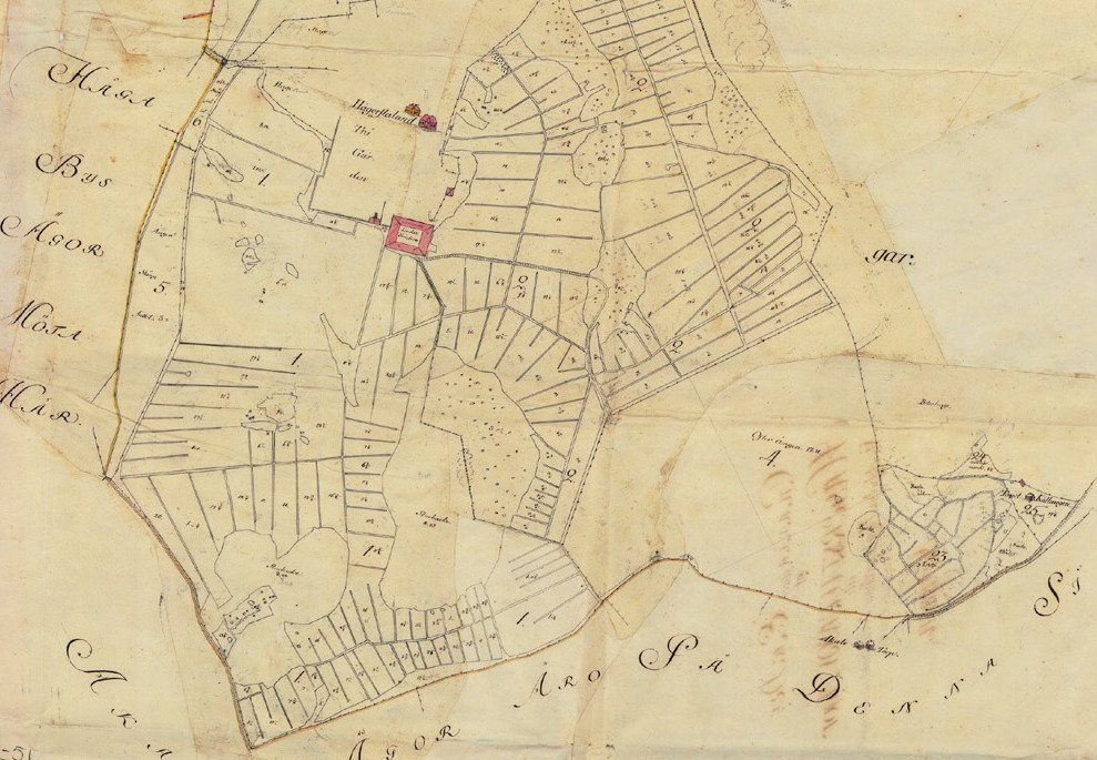 Hägerstalunds gård på en karta från 1803